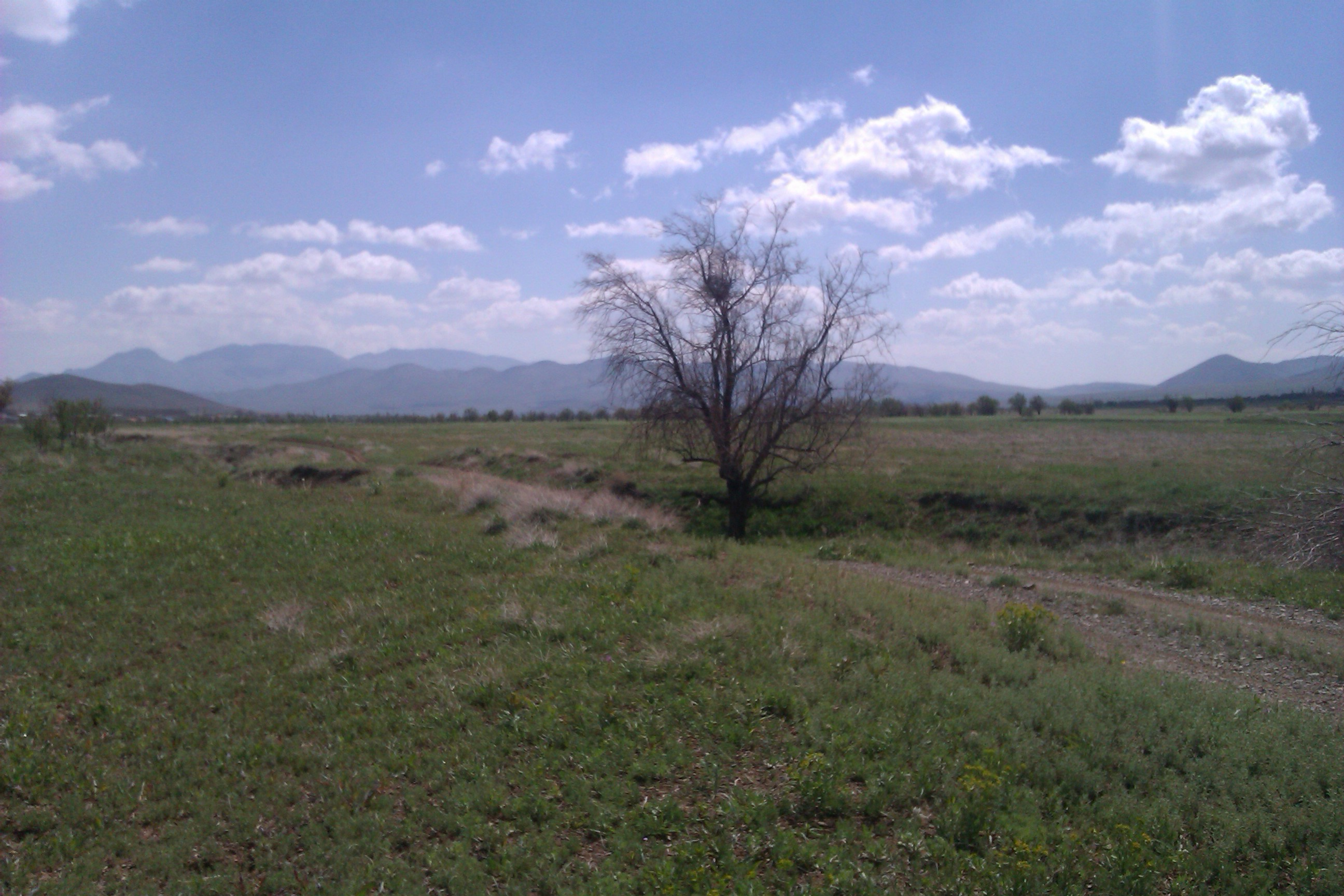 روستای ییلاقی فرج آباد